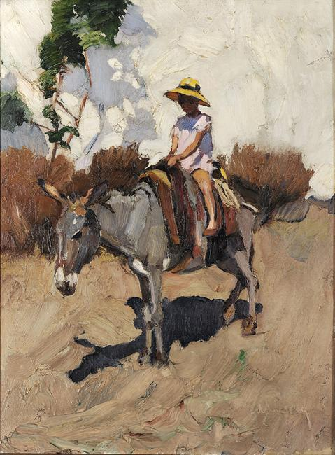 Νίκος Λύτρας, Το γαϊδουράκι